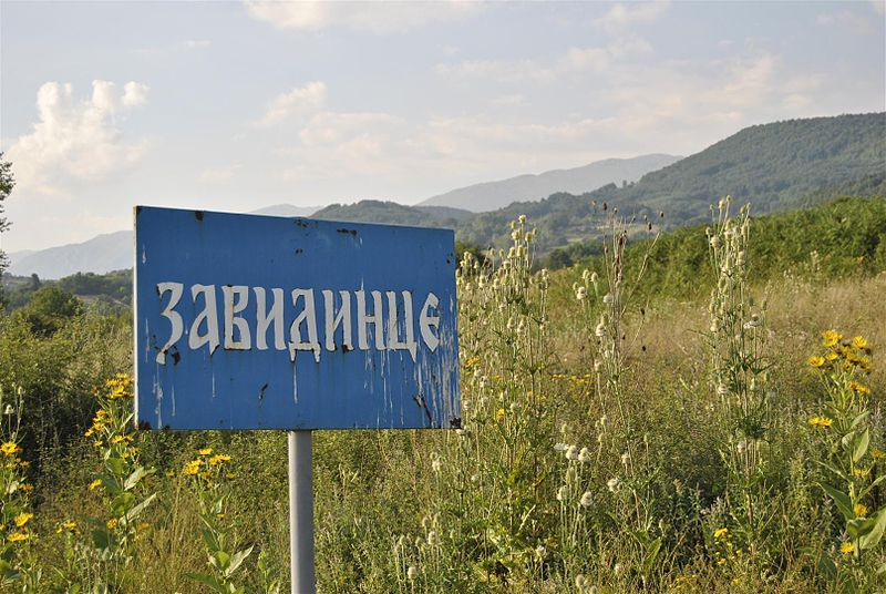 Табла назива села на уласку у исто из села Присјан.